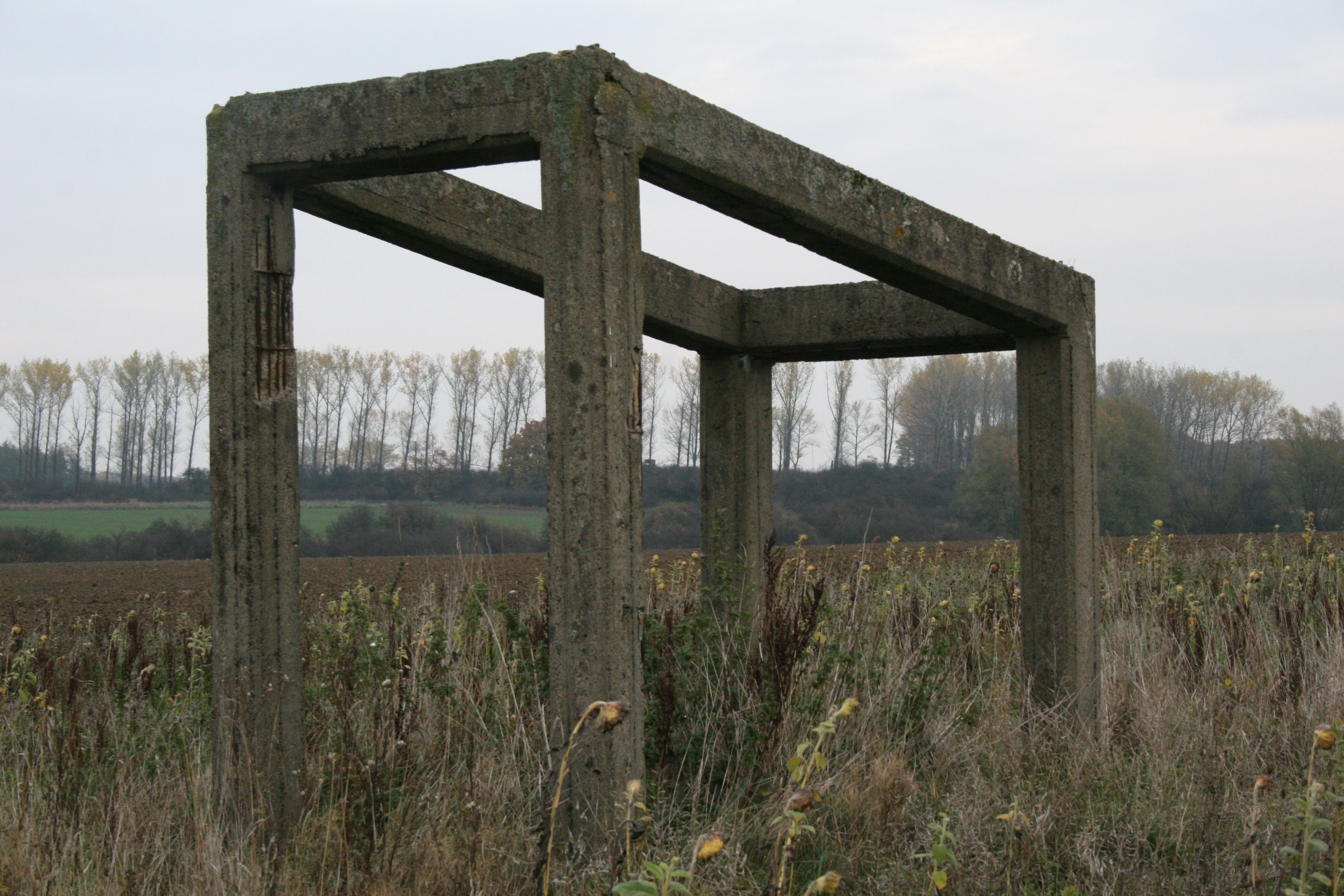 Betonskelett auf dem ehemaligen Lagerplatz